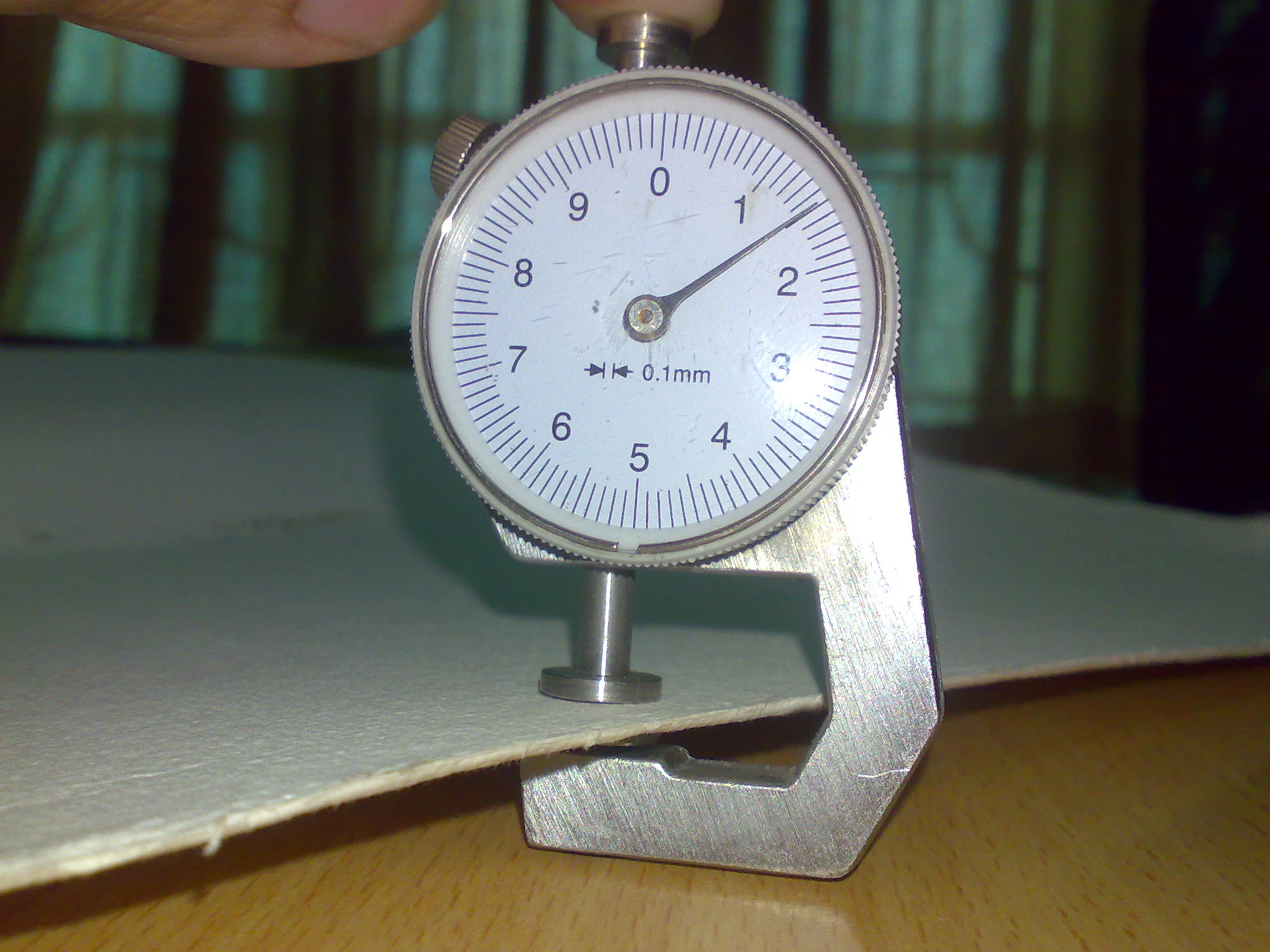 Giấy lót li dày 1.4vi:mm